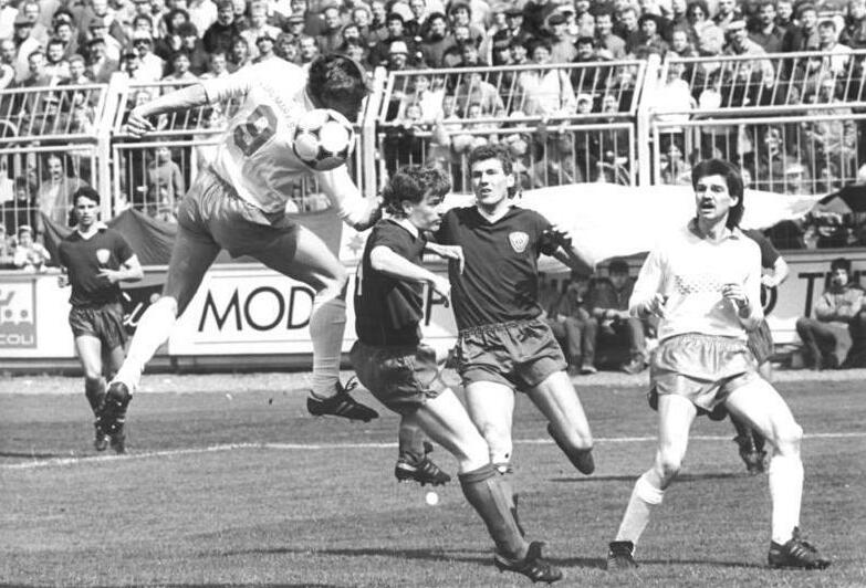 ADN-ZB-Thieme- -6.5.89-ke-K.-M.-Stadt: Fußball-Oberliga FC K.-M.-Stadt - BFC Dynamo 2:1. Hier kann sich Hans Richter gegen Uwe Zöphel und Burkhard Reich vom BFC durchsetzen (v.l.), rechts Wienhold.